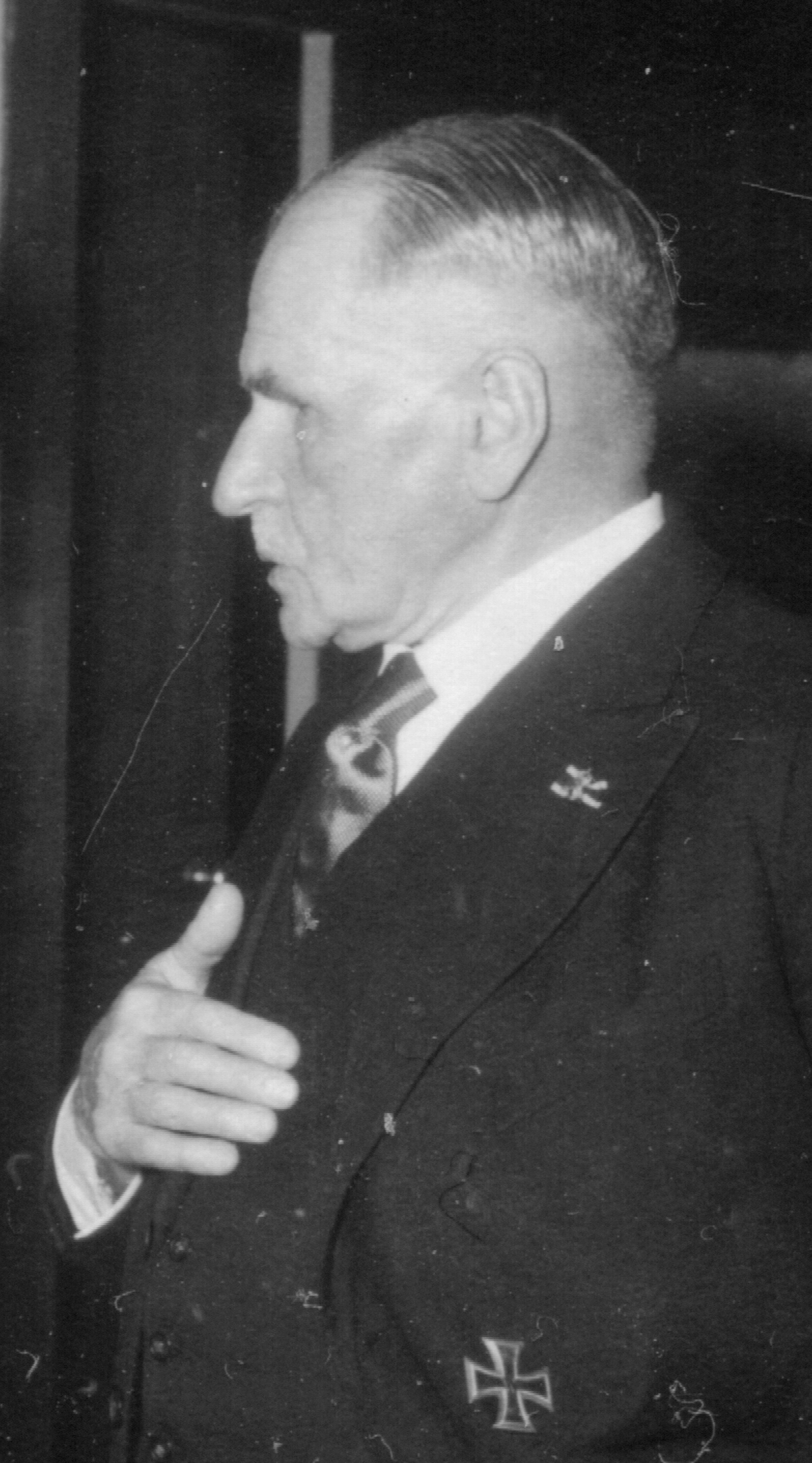 Familienfoto 1954: Erich von dem Bussche-Ippenburg (1878—1957), ehem. General der Artillerie